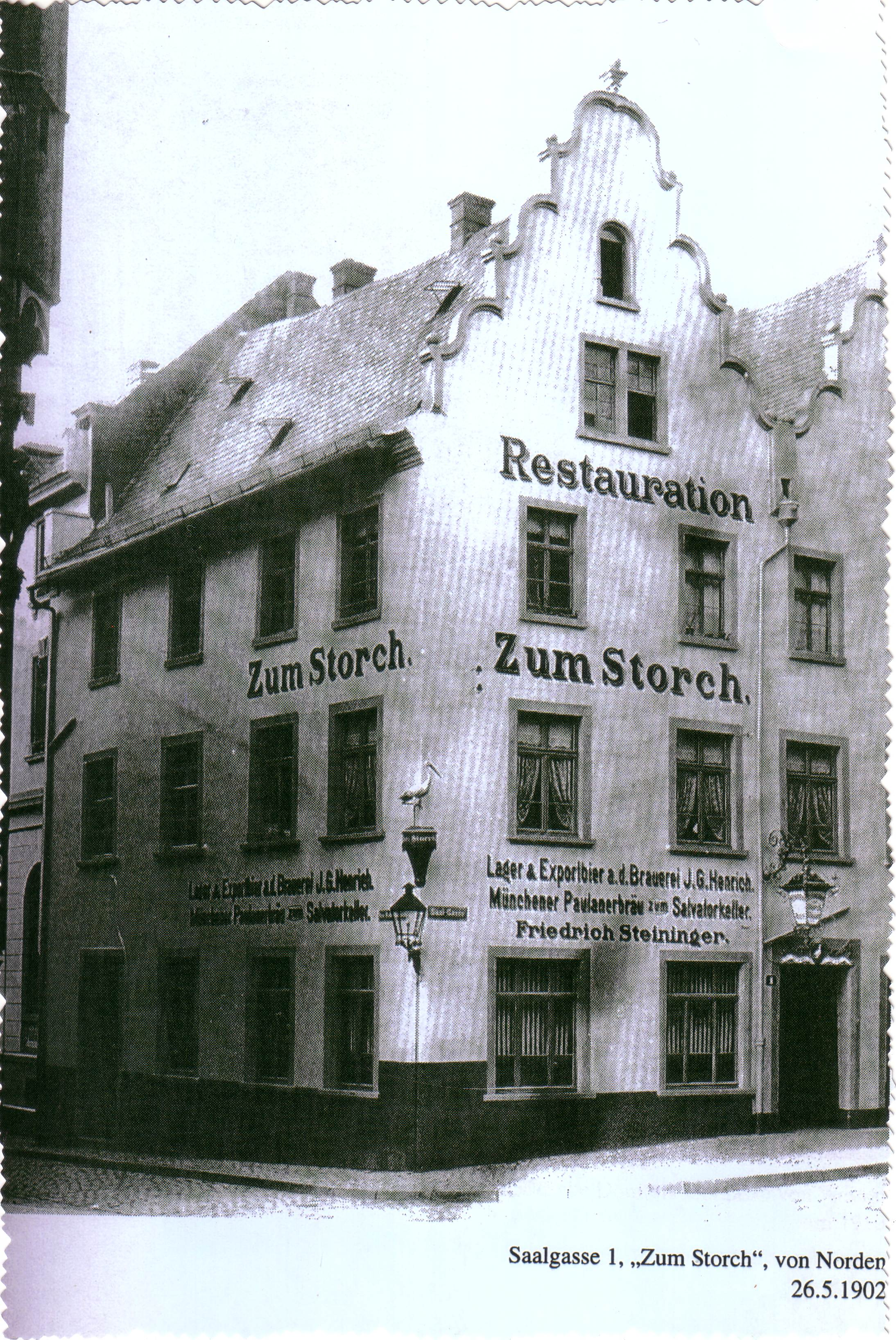 Haus "Zum Storch" in Frankfurt am Main, Saalgasse 1 (jetzt Saalgasse 3-5)